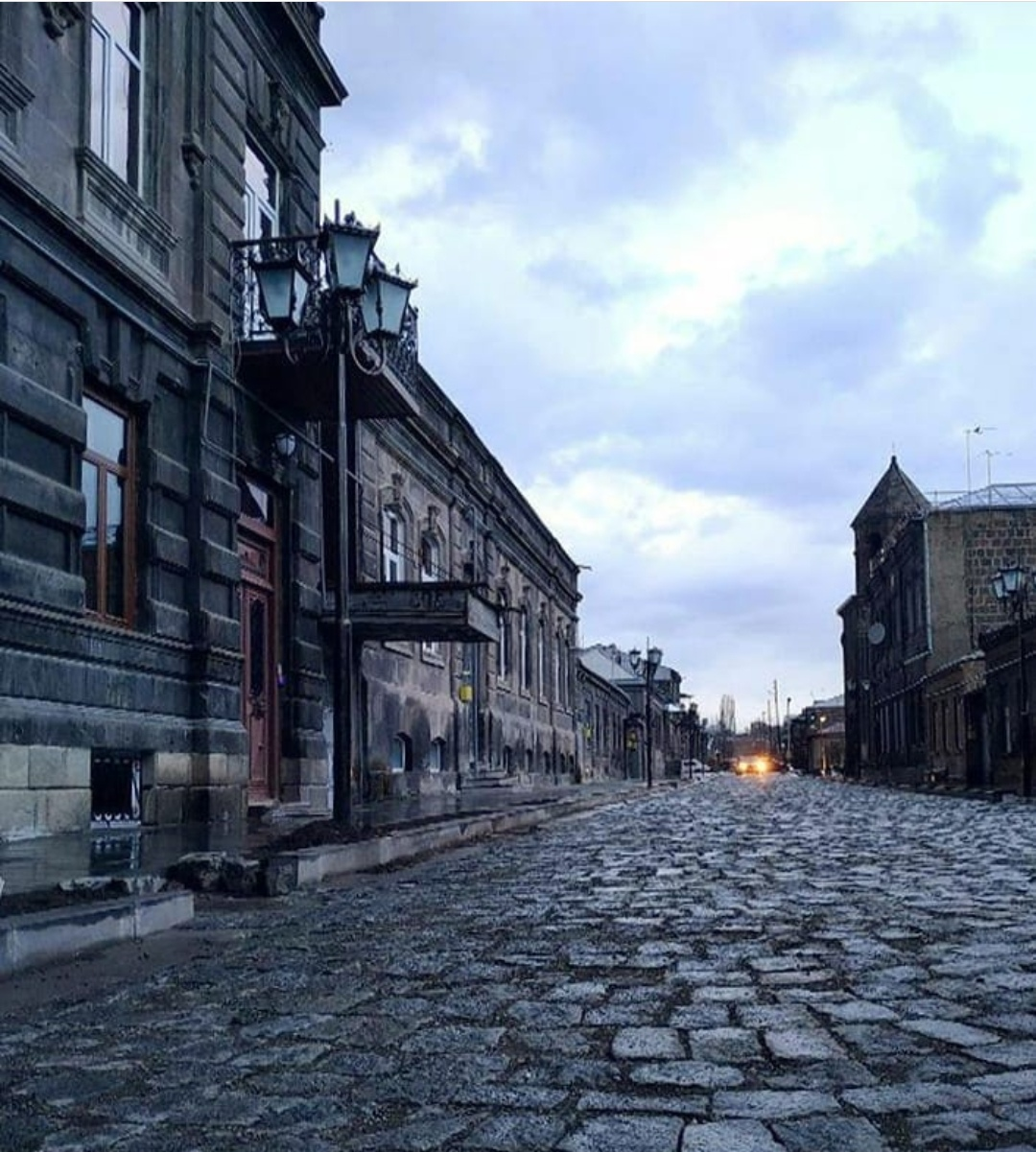 Gyumri rekonstruita kun ŝtonaj stratoj